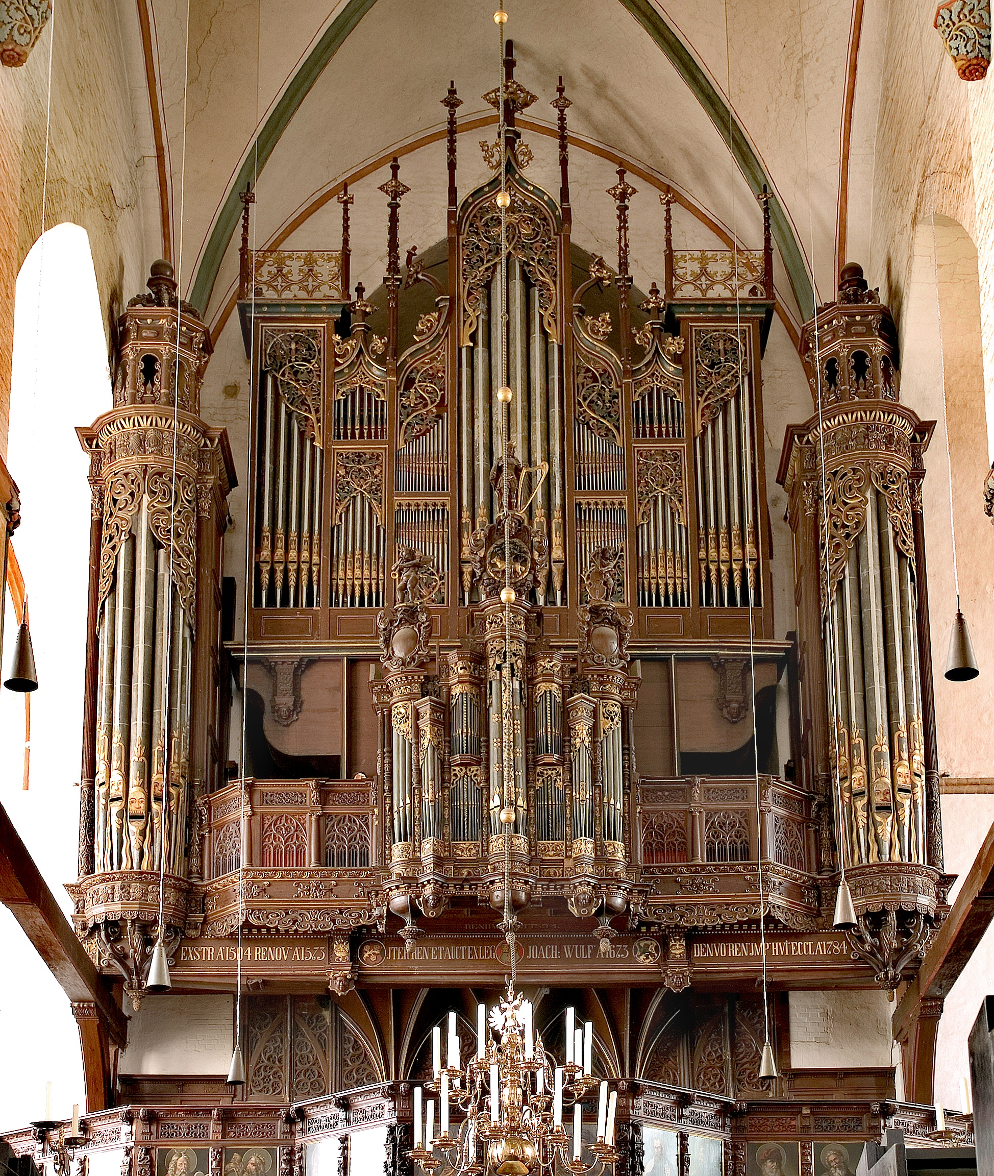 Die Orgel der St. Jakobi Kirche in Lübeck